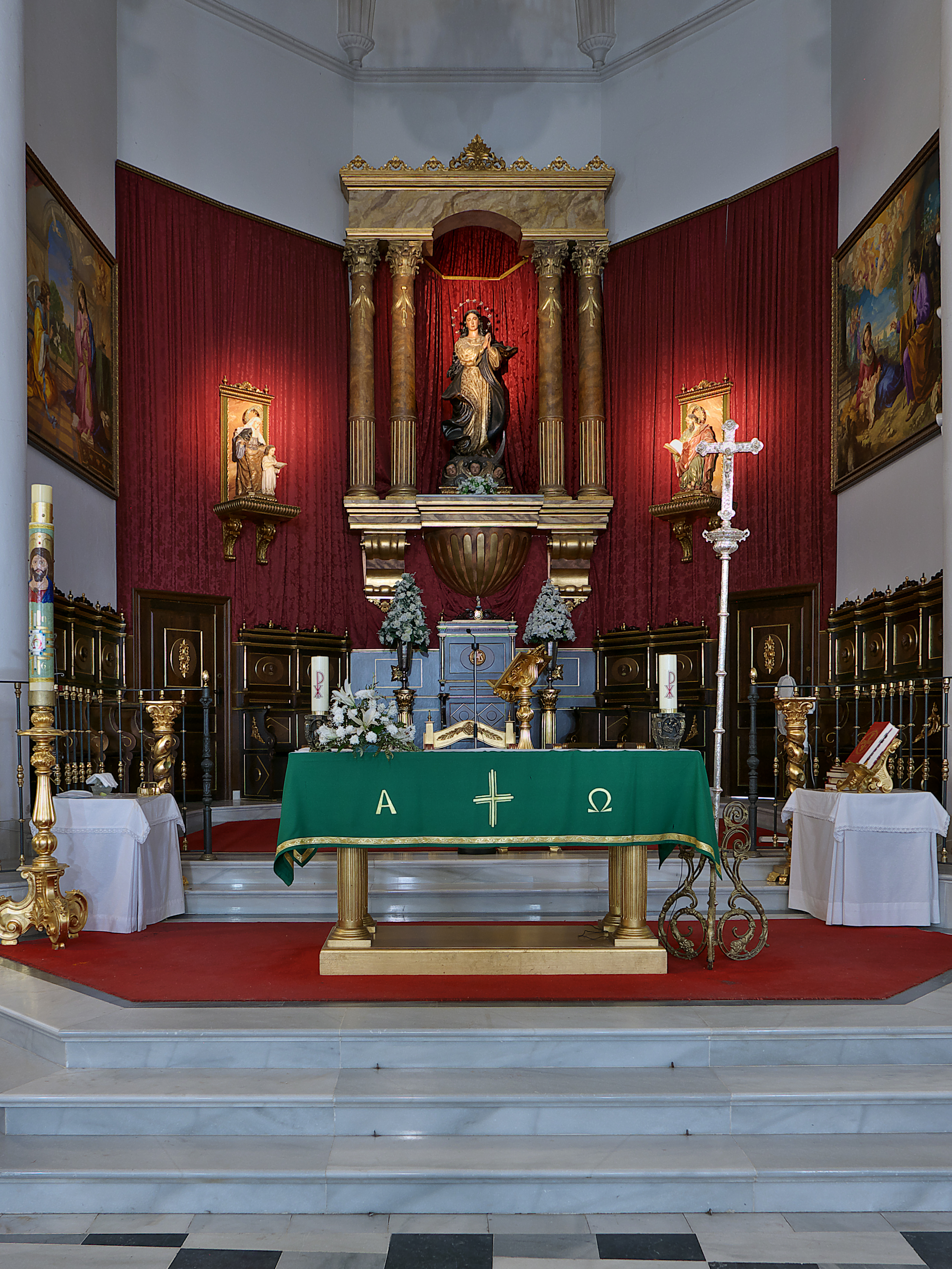 Presbiterio de la iglesia.